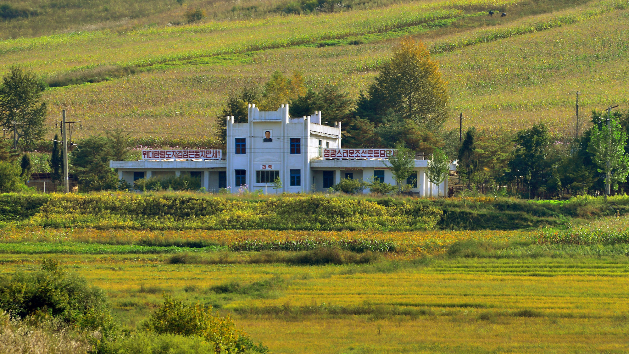 两江道罗竹站